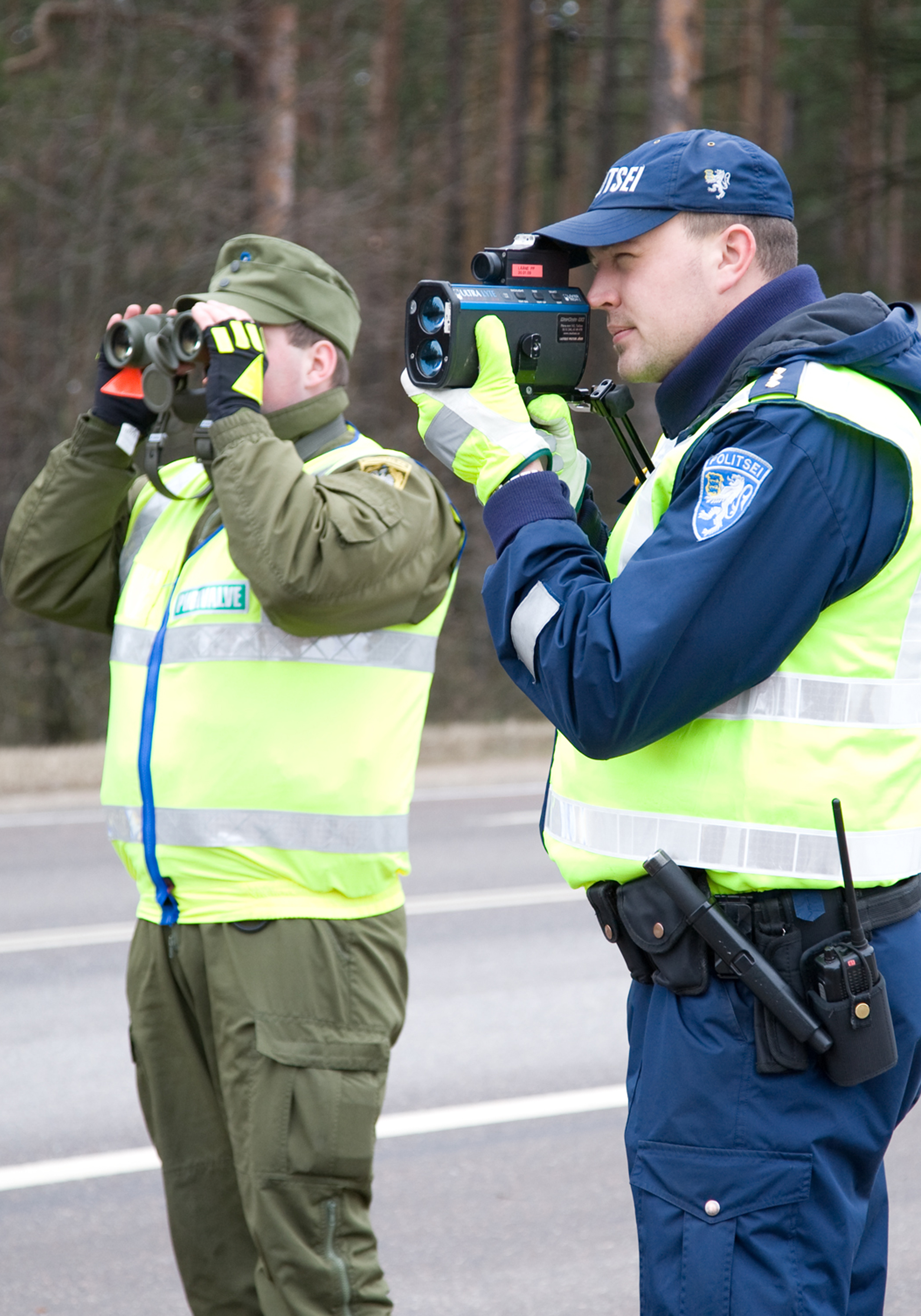 Piirivalve ja politsei ühispatrull.